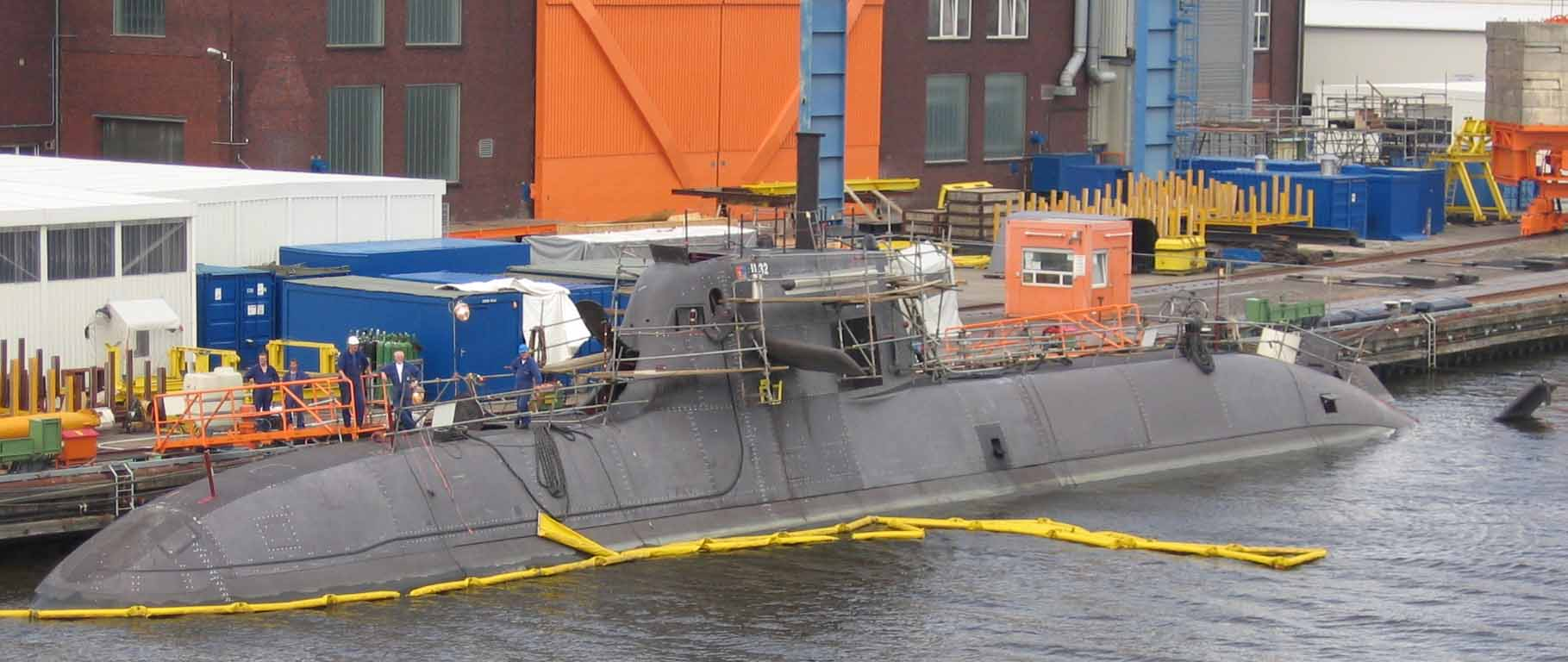 U-Boot U32 vor der Indienststellung im Hafen von Emden